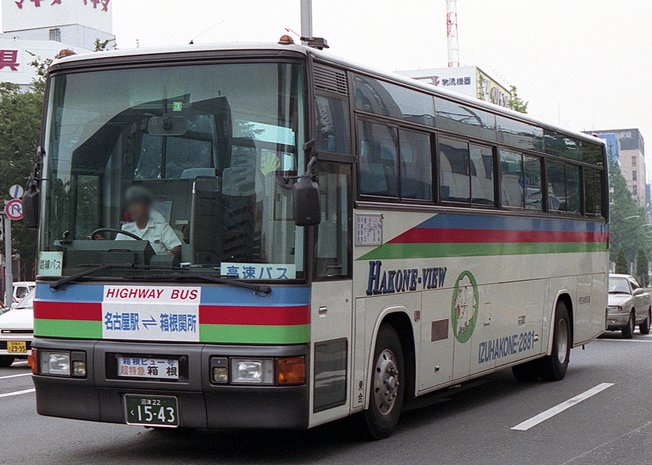 伊豆箱根鉄道 箱根ビュー号 日産ディーゼル P-RA53TAE 西工SD-I